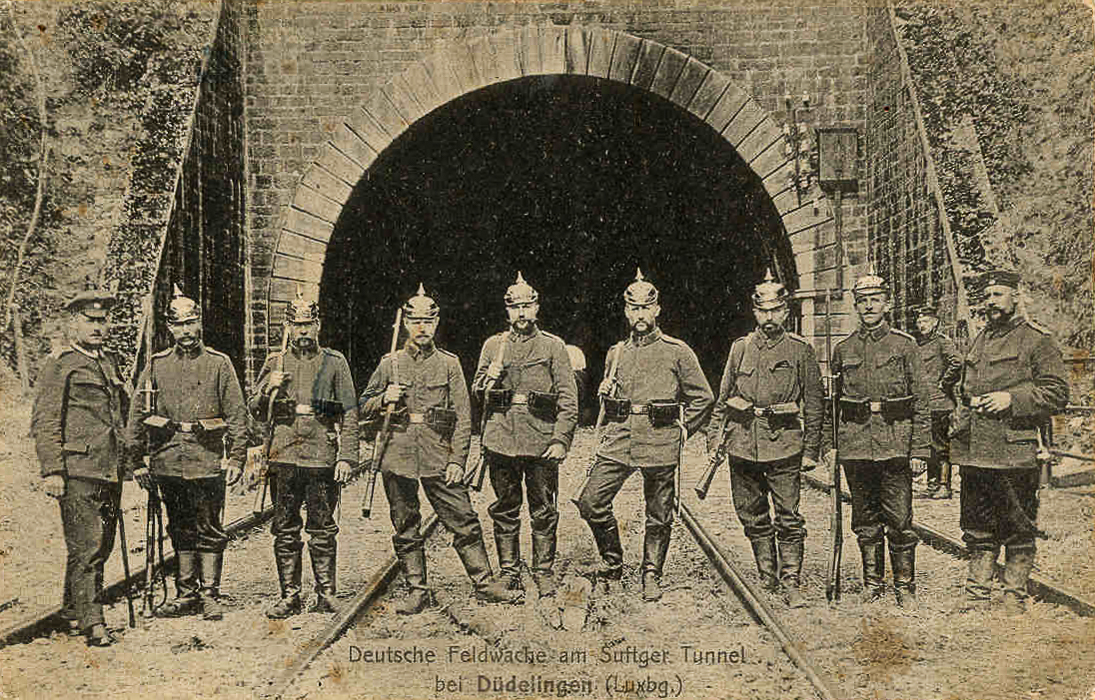 Am Éischte Weltkrich bewaachen däitsch Zaldoten den Eisebunnstunnel zu Diddeleng. Dësen Tunnel, op der strategesch wichtiger Linn Lëtzebuerg-Metz gouf 1940 vun der franséischer Arméi gesprengt fir d'Virrécke vun de Preisen opzehalen.